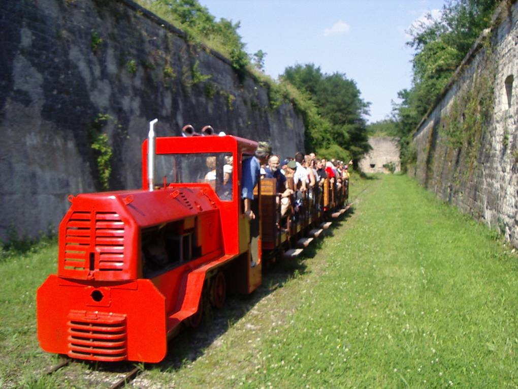 train touristique du fort qui fonctionne dans le cadre de la visite